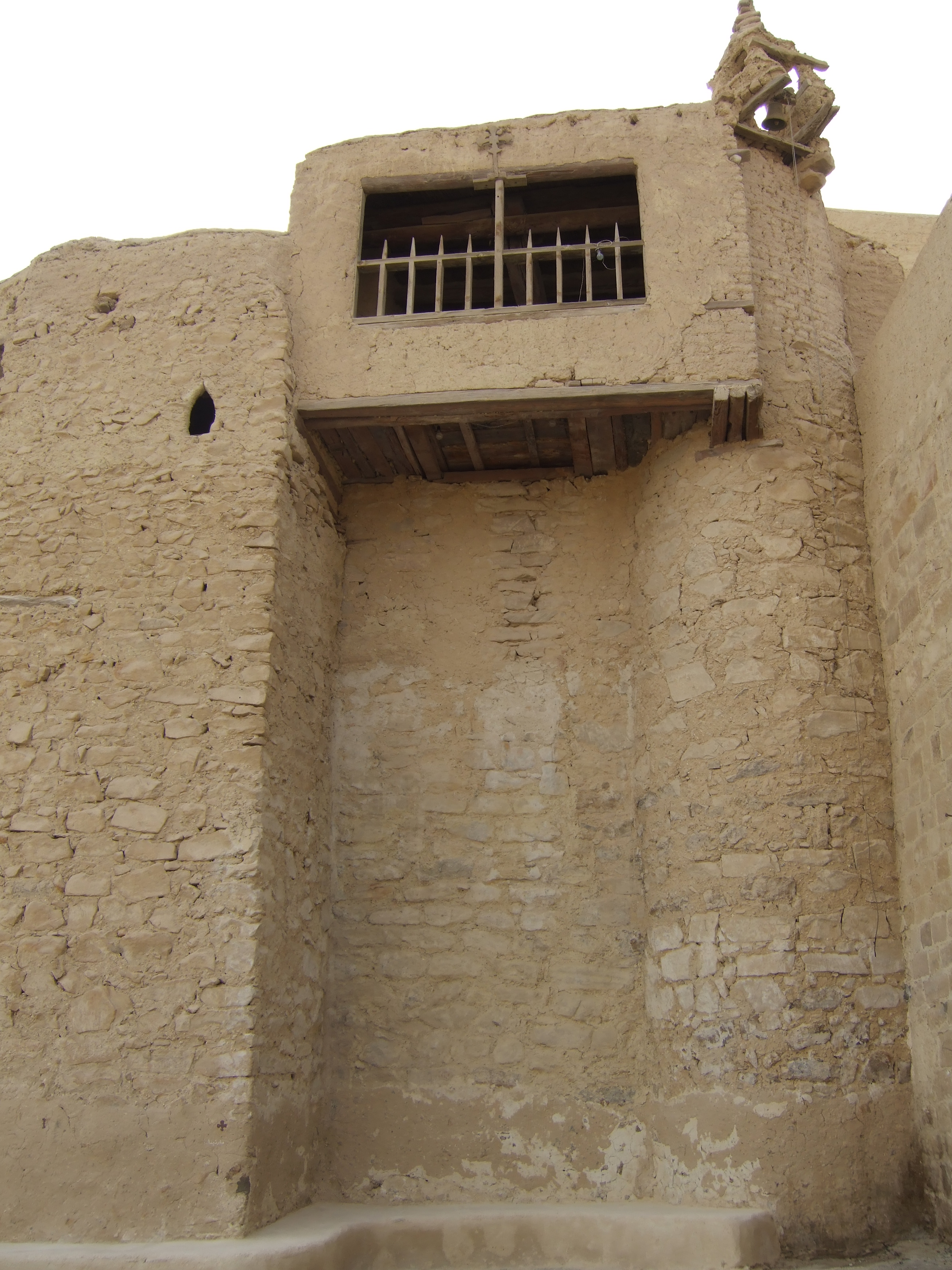 Foto LR 2007